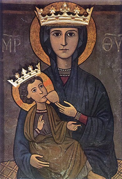 Giuseppe Papa, Giuseppe Papa, scansione santino, pubblico dominio, rilascio tutti i diritti, sono l'autore